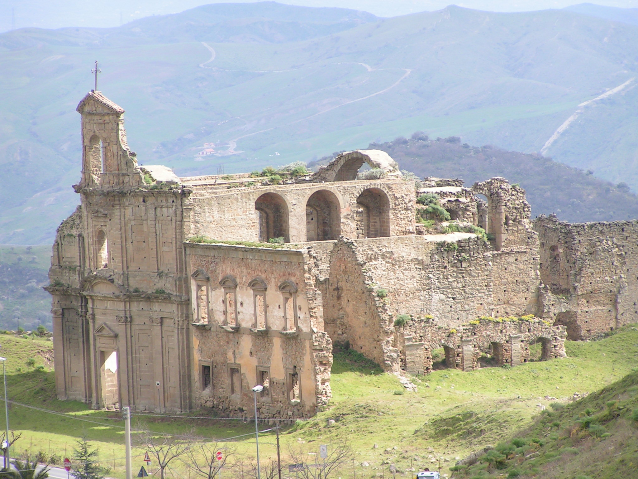 Troina, i resti vetusti del monastero basiliano di san Michele Arcangelo